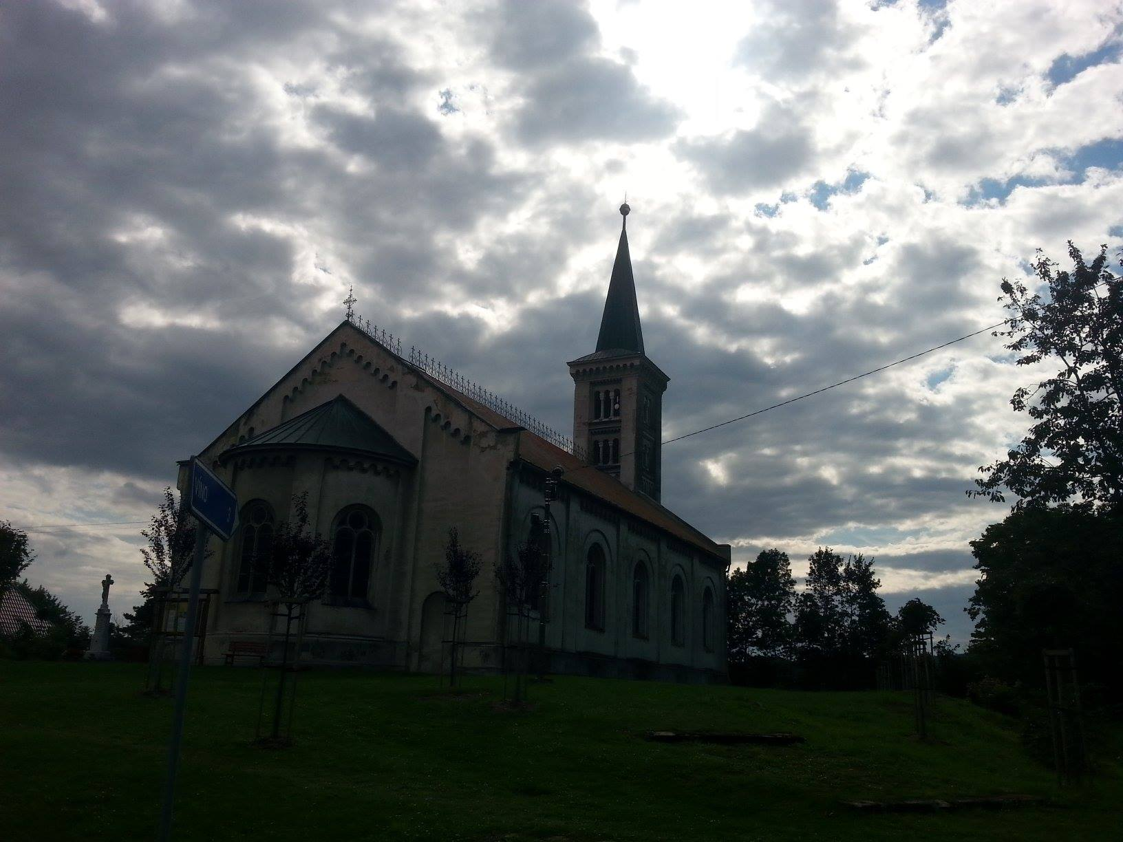 Kostel sv. Kateřiny ve Slezských Rudolticích.